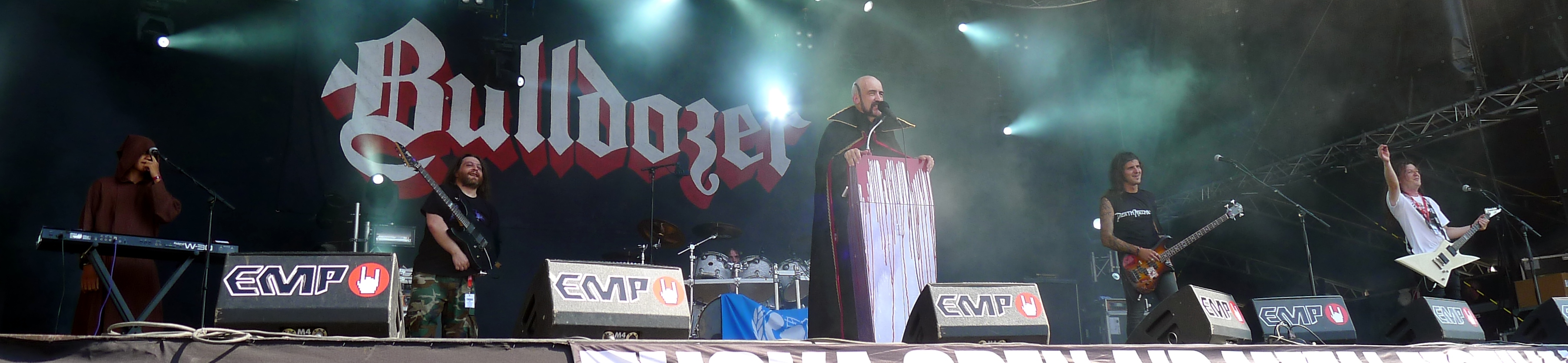 Bulldozer live am Tuska Open Air 2011